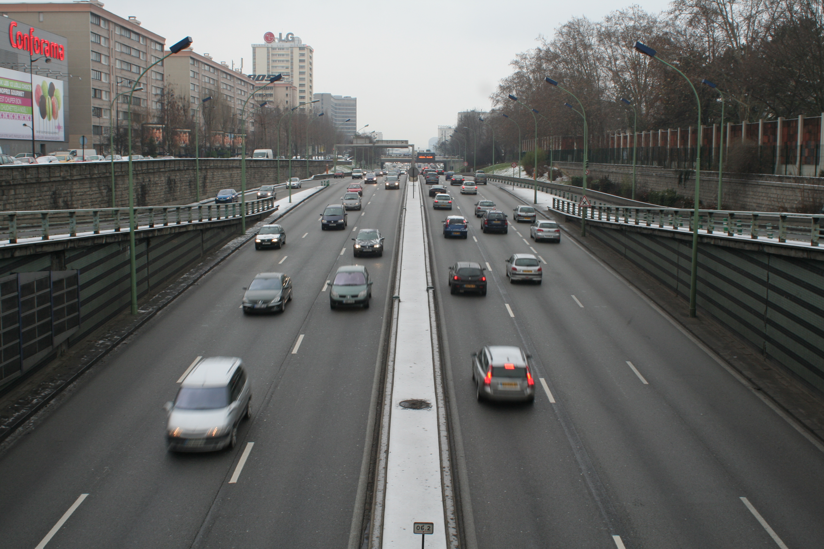 Périphérique, porte de Chatillon.